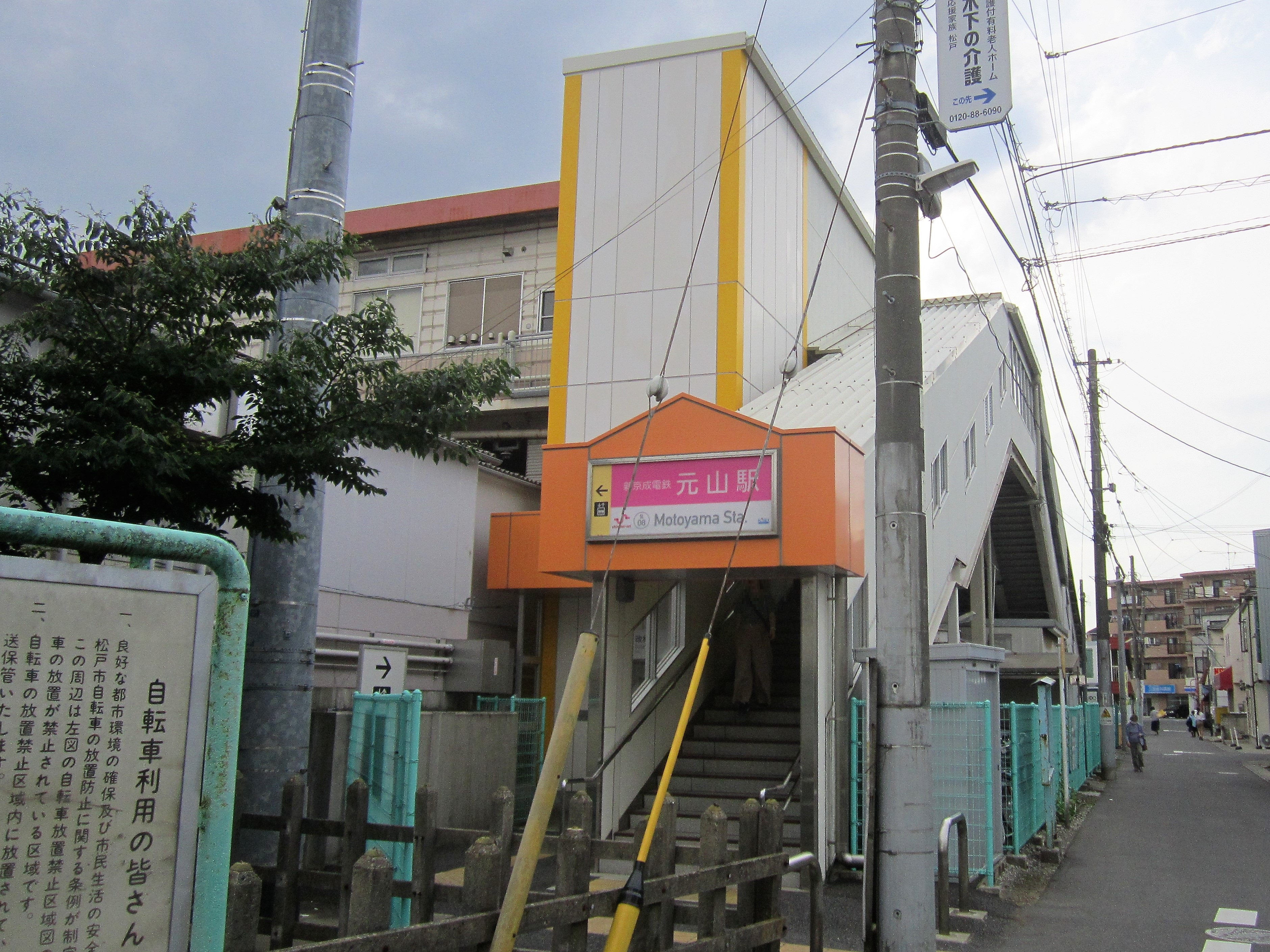 新京成電鉄・元山駅東口（2020年6月） Canon PowerShot A2200